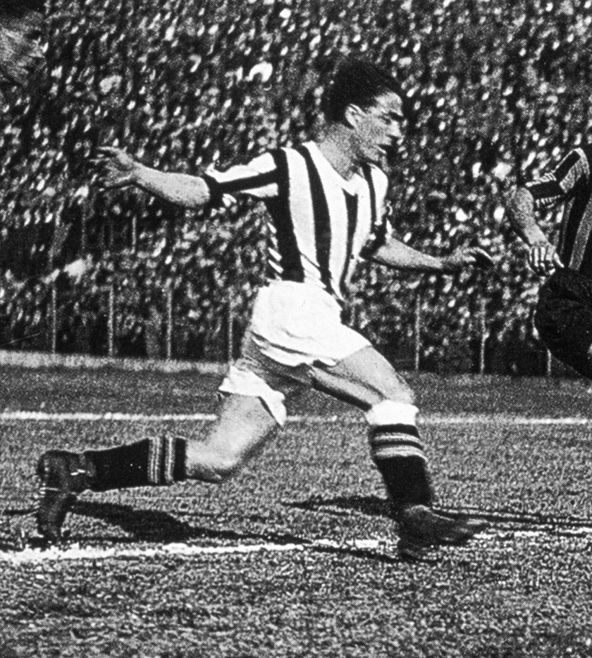 Il calciatore italiano Federico Munerati in azione alla Juventus tra gli anni 20 e 30 del XX secolo.